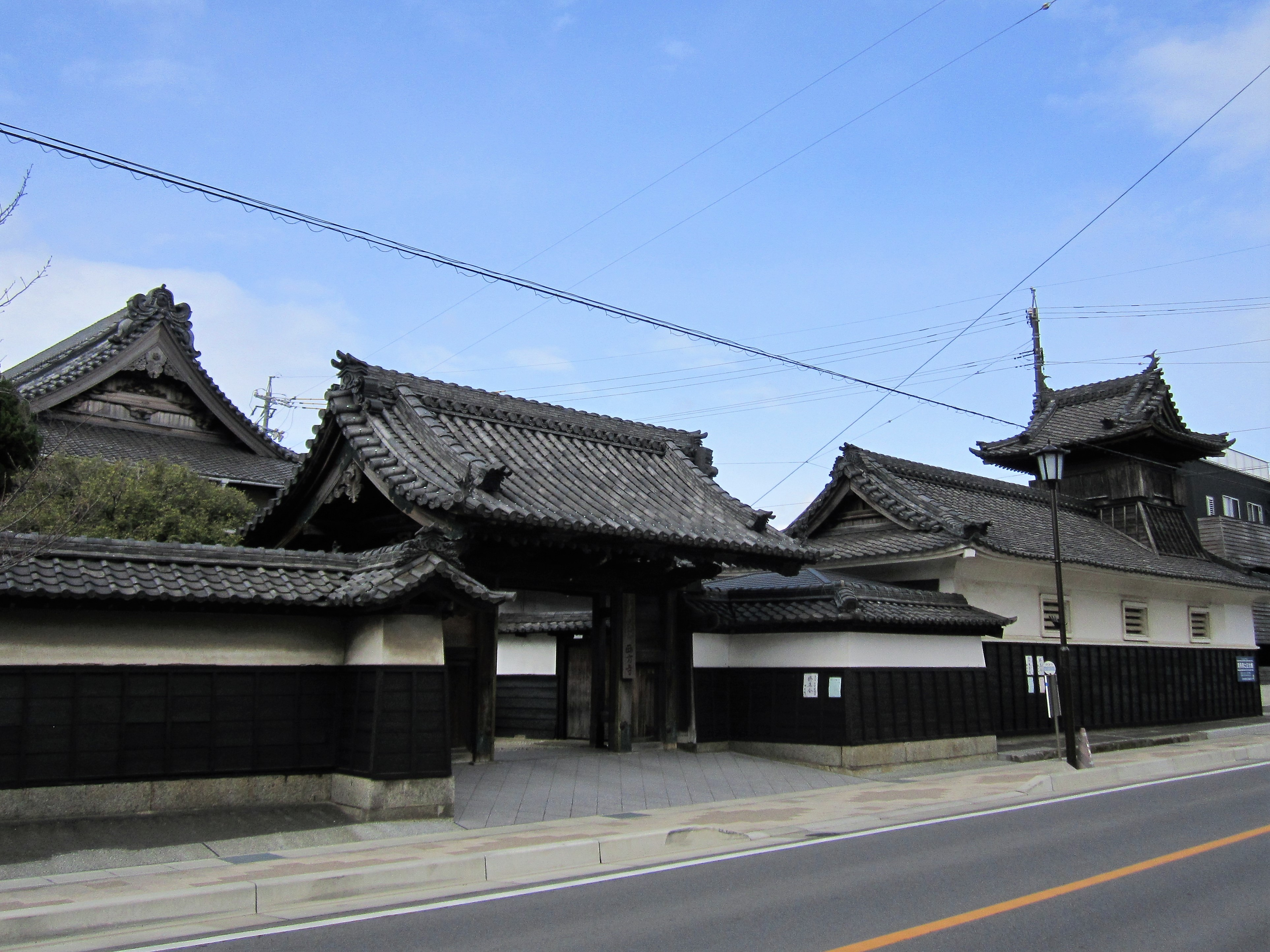 法応山 西方寺（碧南市浜寺町） Canon PowerShot A2200